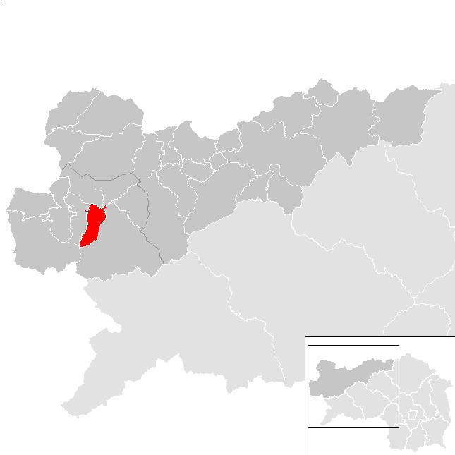 Lage von Michaelerberg-Pruggern im Bezirk Liezen